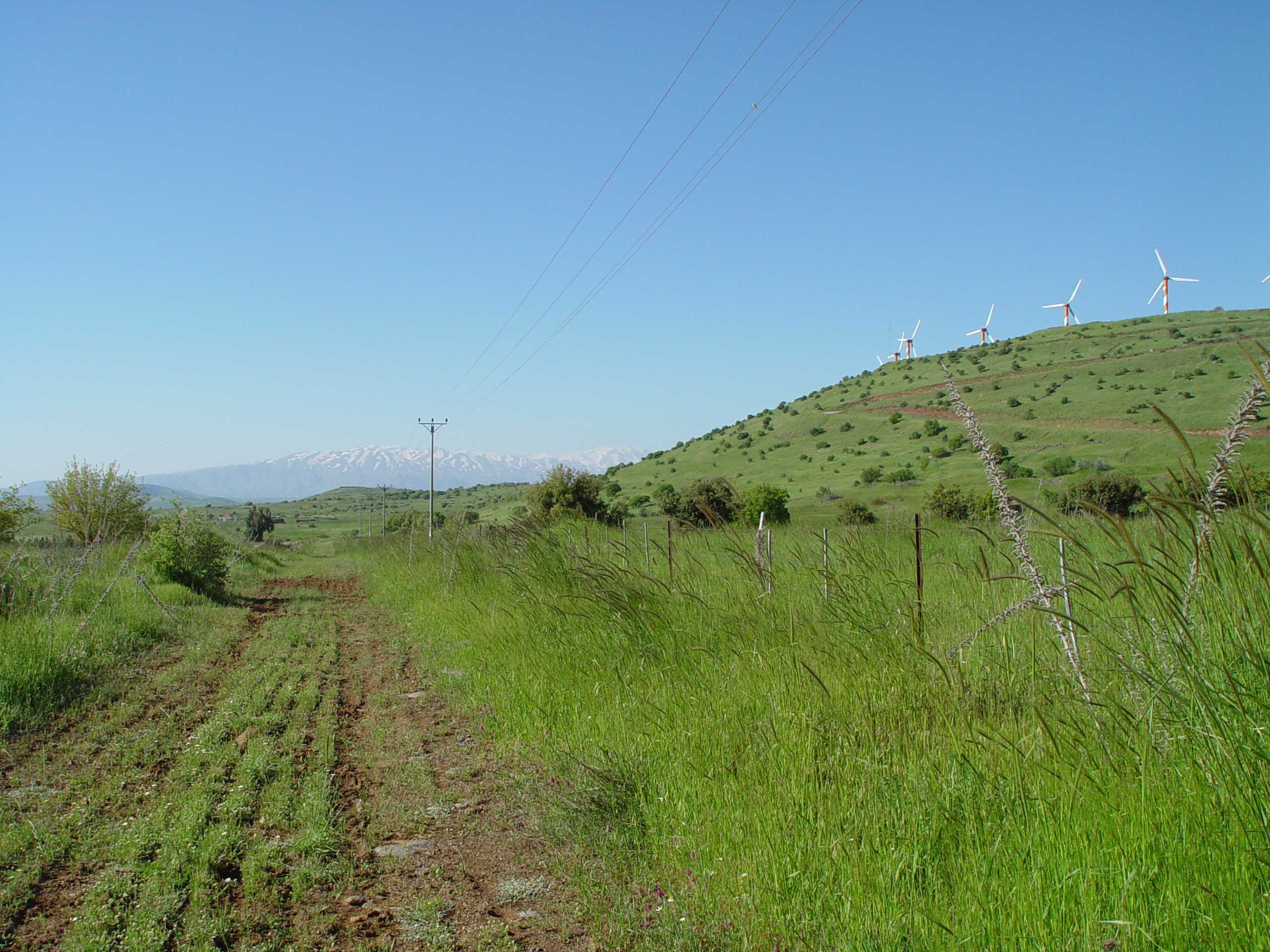 טורבינות רוח והר החרמון, רמת הגולן. צילום, --גיא חיימוביץ 05:19, 11 מרץ 2006 (UTC)